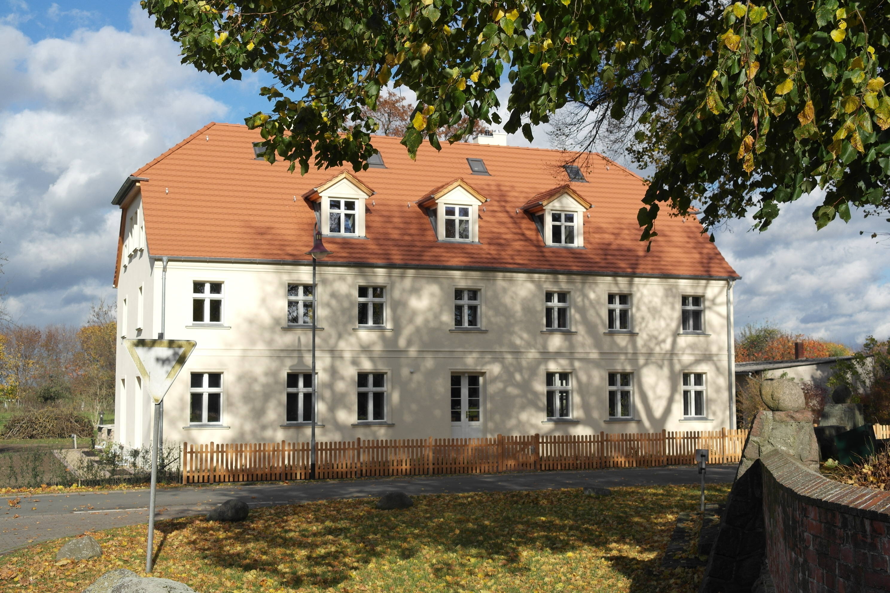 Stechow, denkmalgeschütztes Pfarrhaus